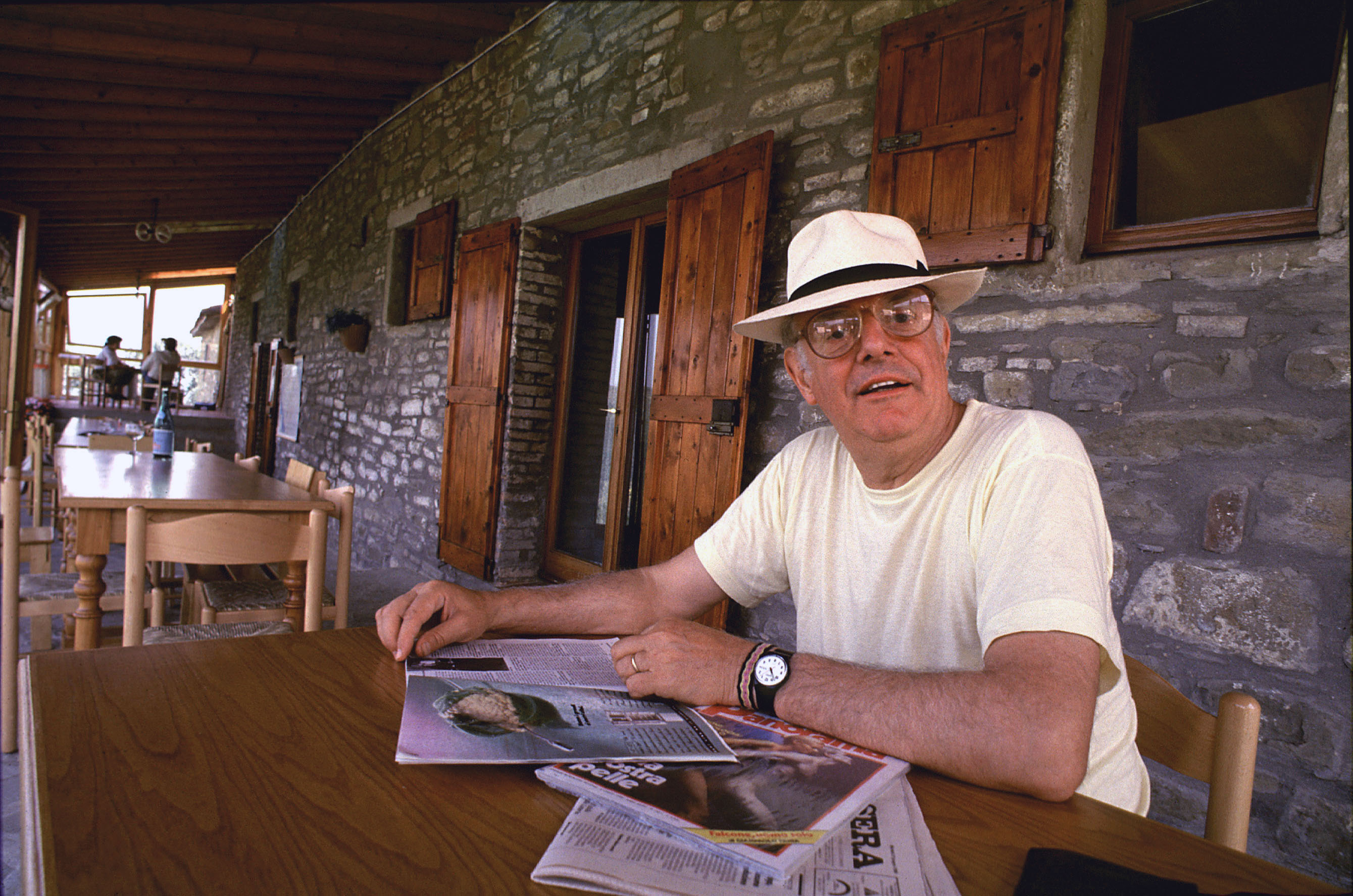 Il drammaturgo e attore Dario Fo alla Libera Università di Alcatraz presso Gubbio